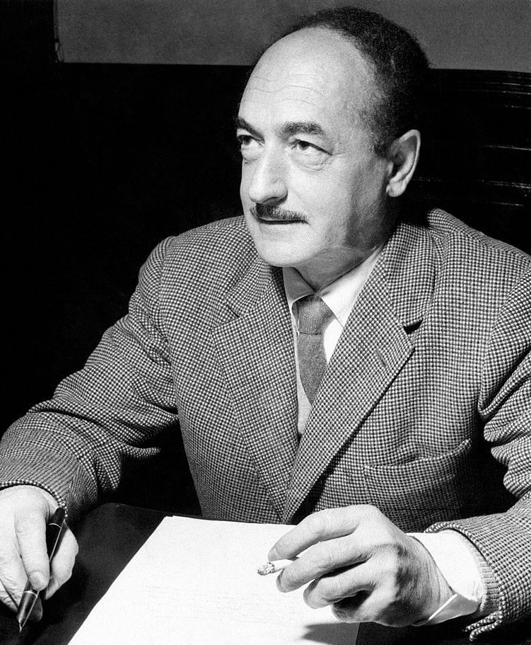 Salvatore Quasimodo in Italy